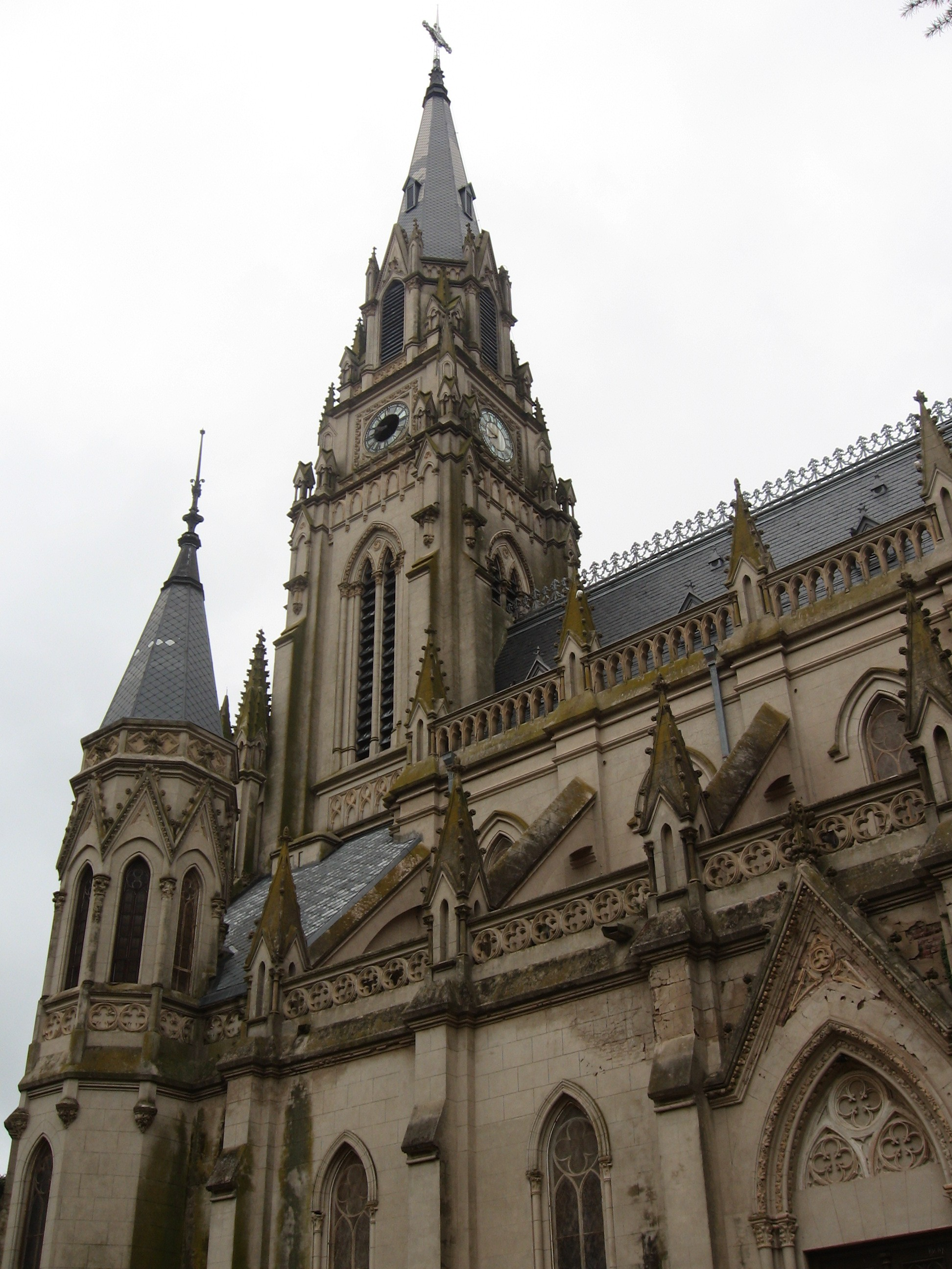 Iglesia Catedral de la ciudad bonaerense de Mercedes, fotografiada desde atrás